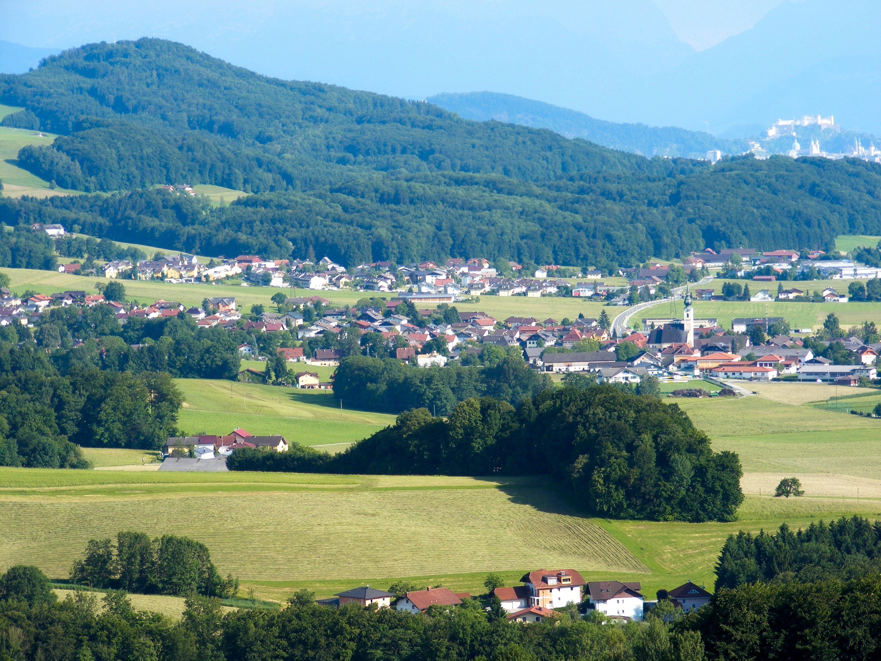 Blick vom Haunsberg Richtung Süden mit Anthering.